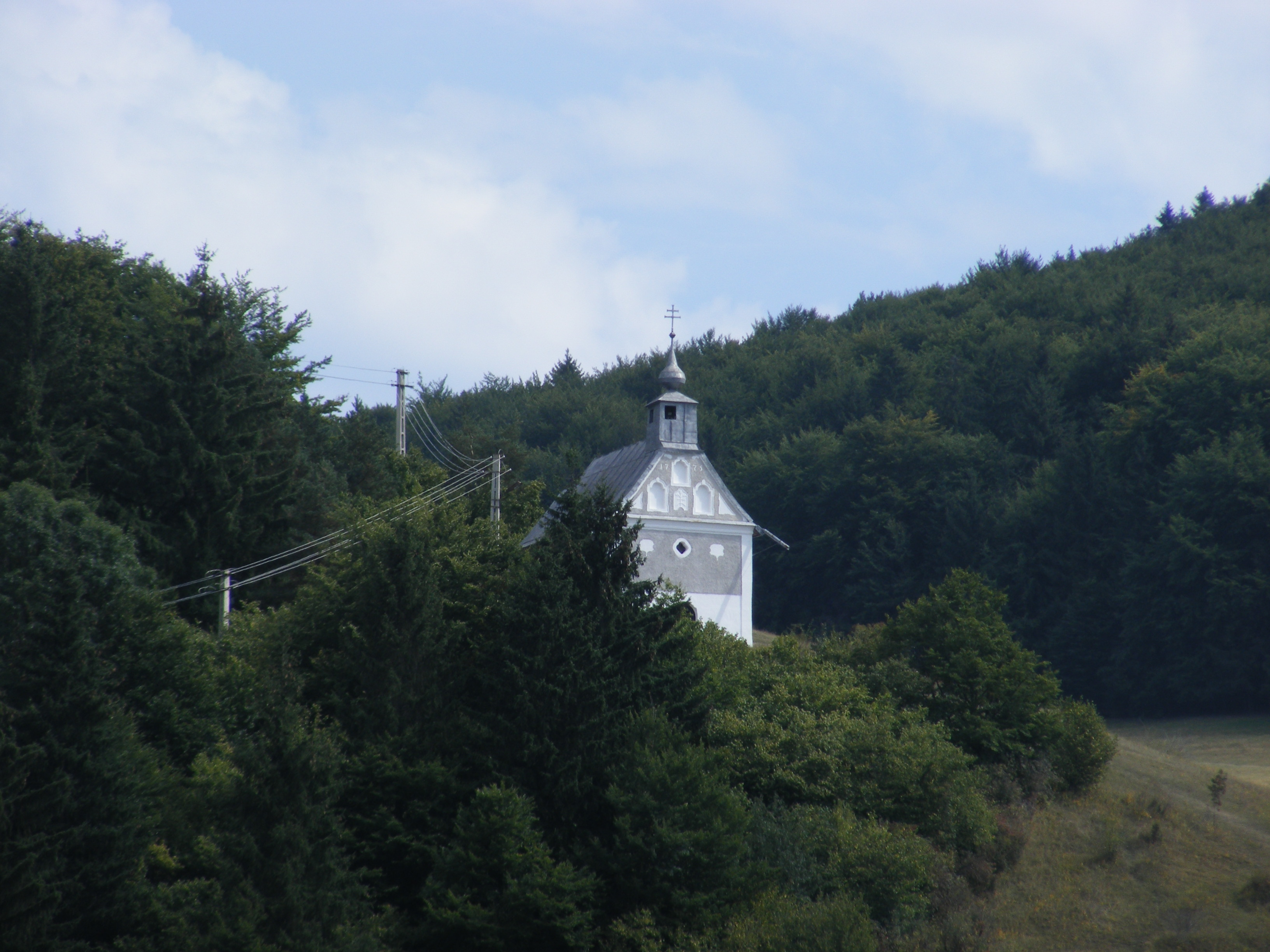 Szent Antal kápolna, Csíksomlyó